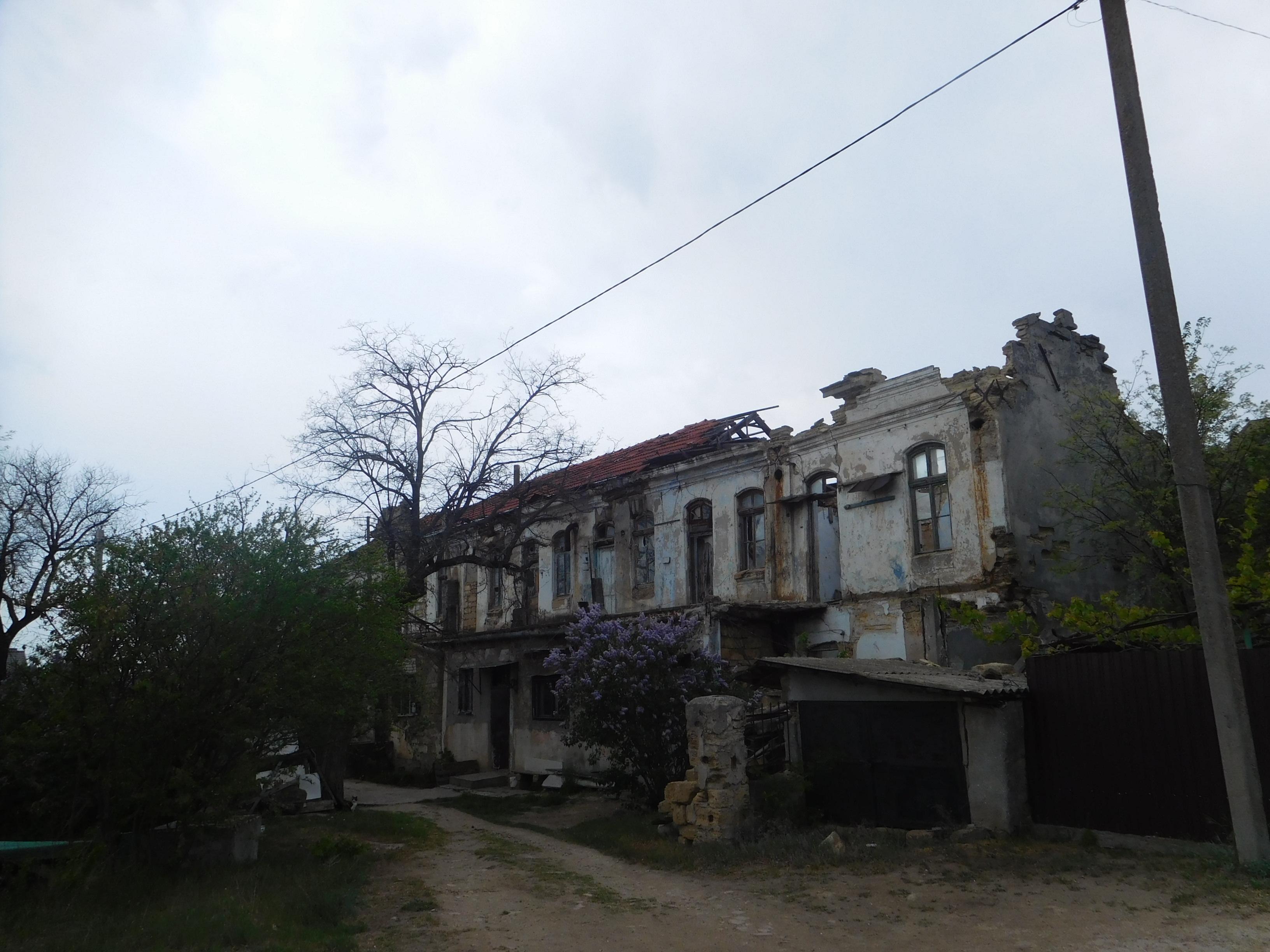 Маєток Генерала Жевахова, с. Латівка, Біляївський район, Одеська область